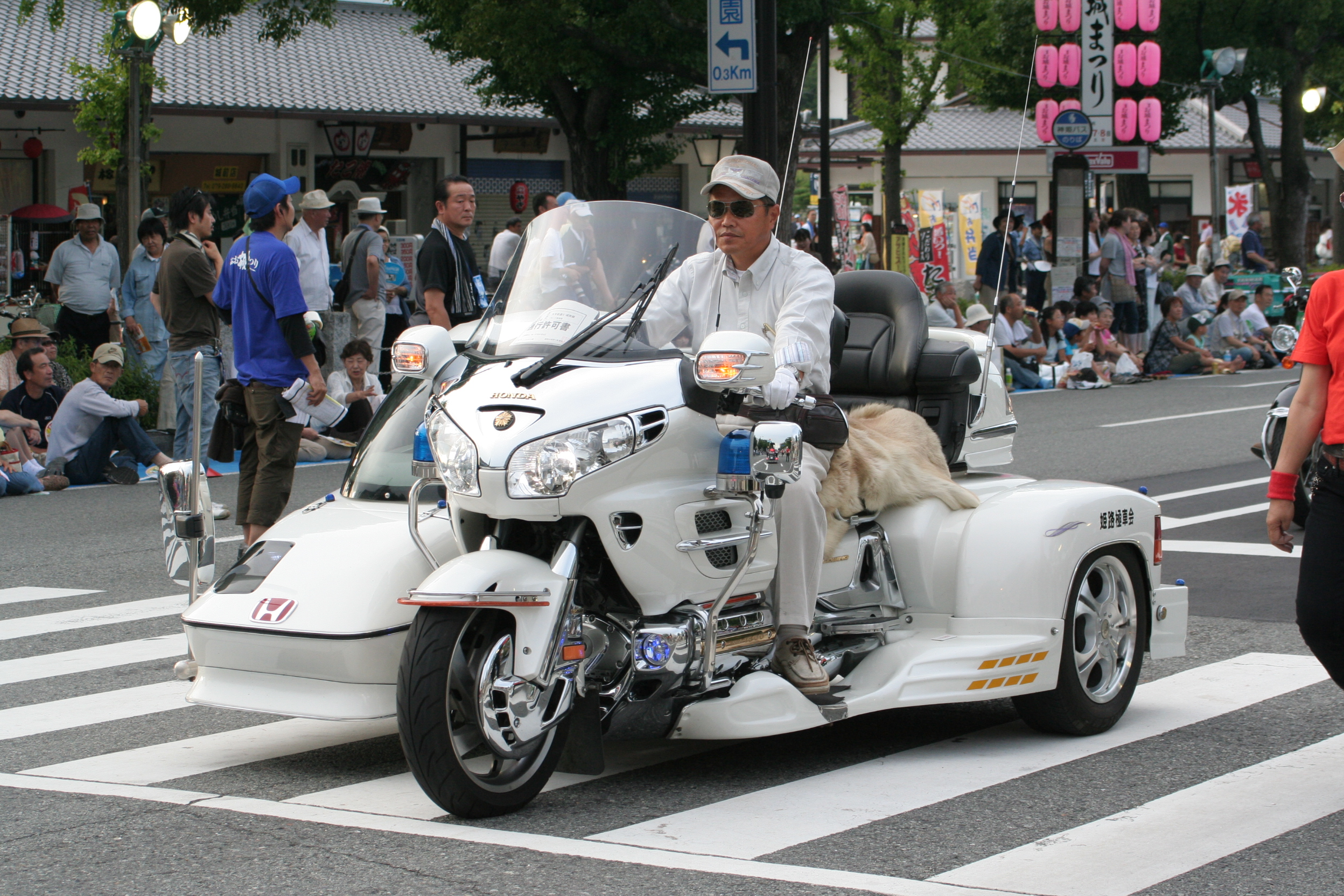 姫路お城祭り。2010年8月6日から9日の3日間に兵庫県姫路市にて開催された姫路の祭り。2日目の大手前公園および大手前通りでのパレードの模様。